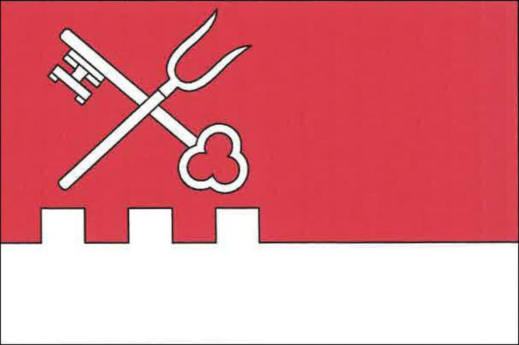 Vlajka obce Dolní Cerekev